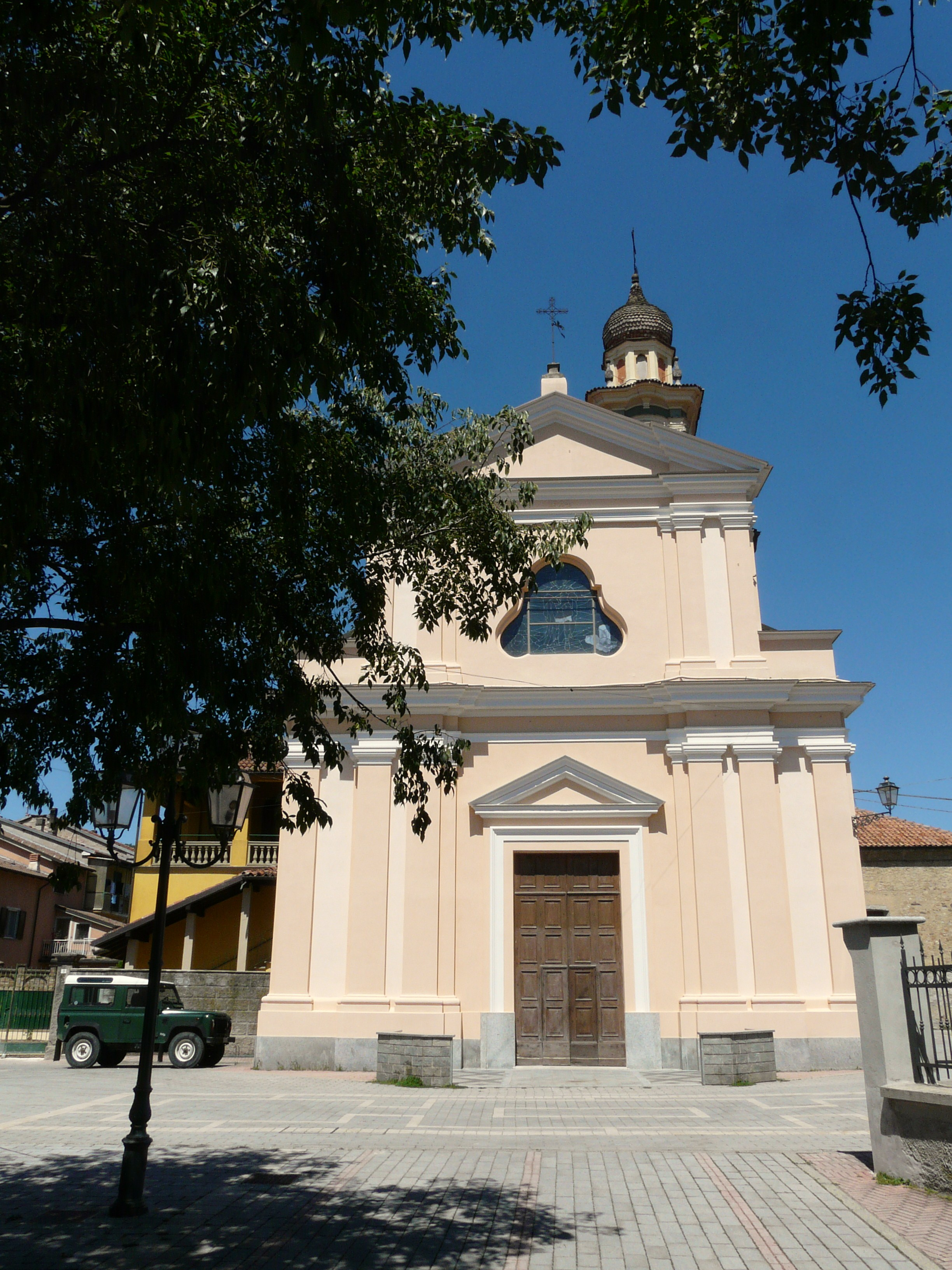 Chiesa di San Vittore, Borghetto di Borbera, Piemonte, Italia